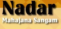 Nadar